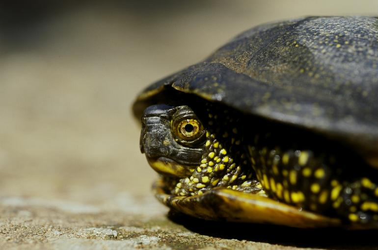 Emys orbicularis